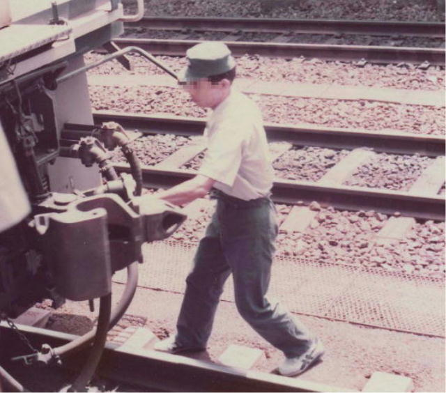 軽井沢駅にて撮影